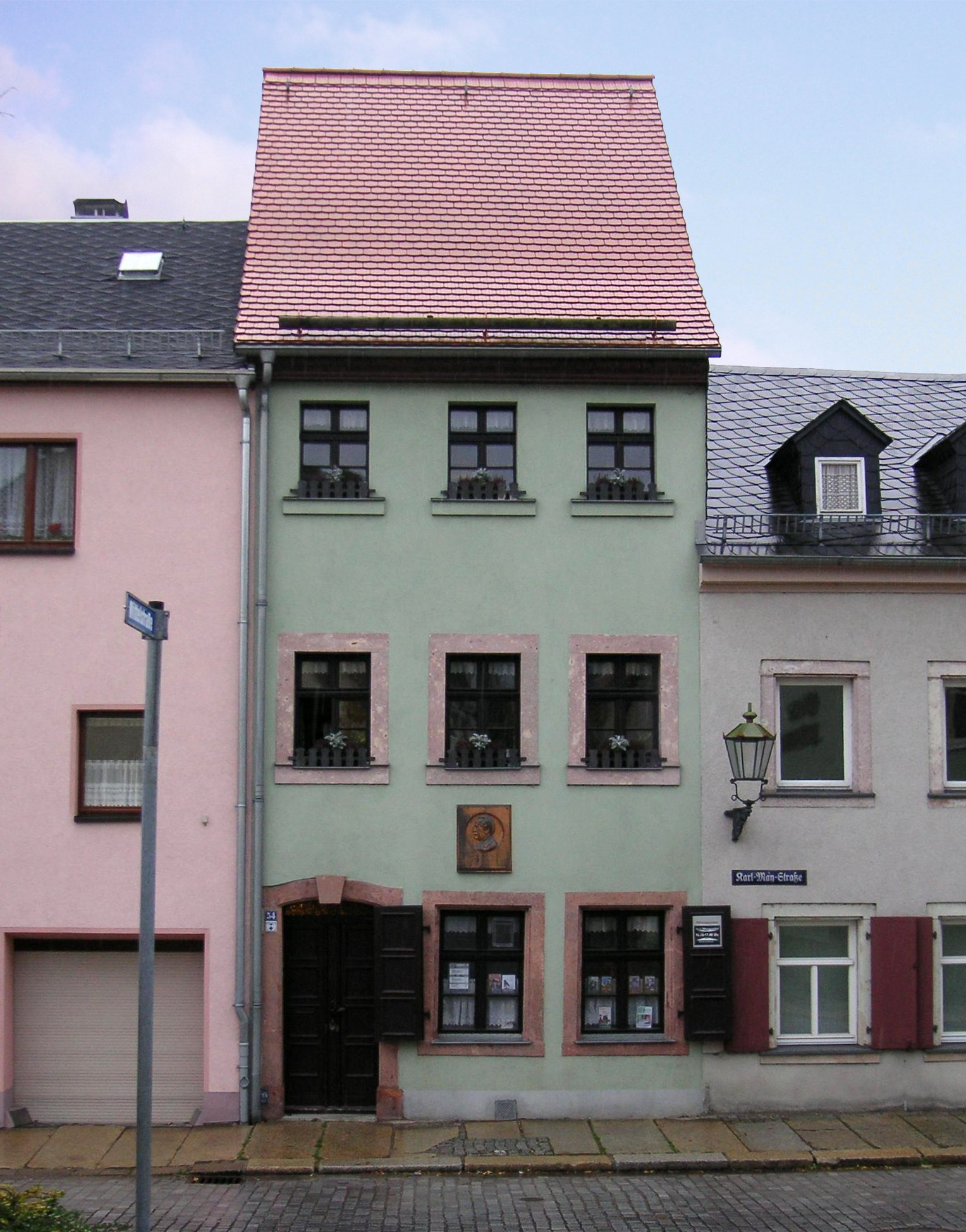 Geburtshaus von Karl May in Hohenstein-Ernstthal. Autor / Quelle: Selbst fotografiert im Herbst 2005. Lizenz: Keine Rechte vorbehalten. (Gemeinfrei)